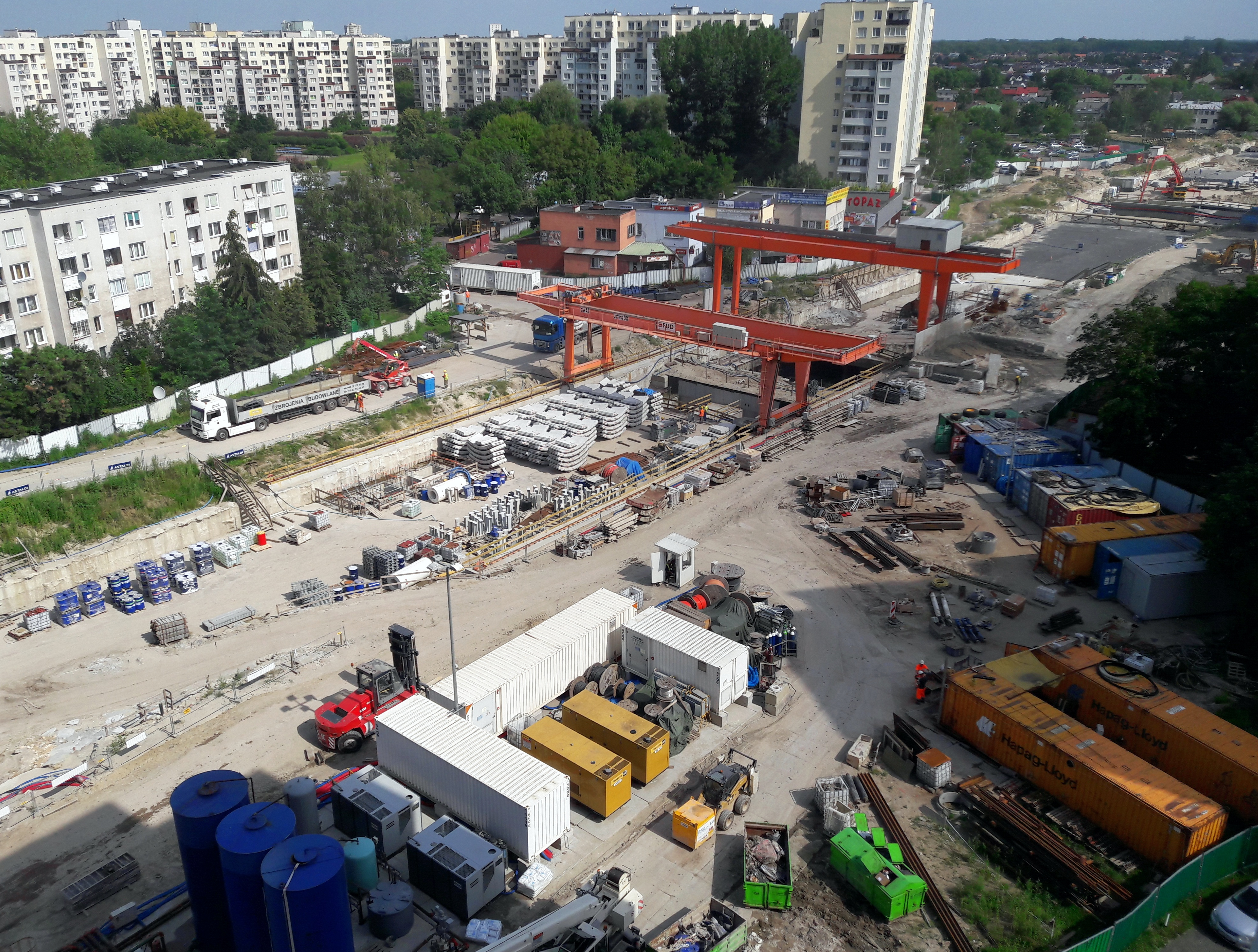 Budowa stacji C18 Trocka, II linii metra, Warszawa